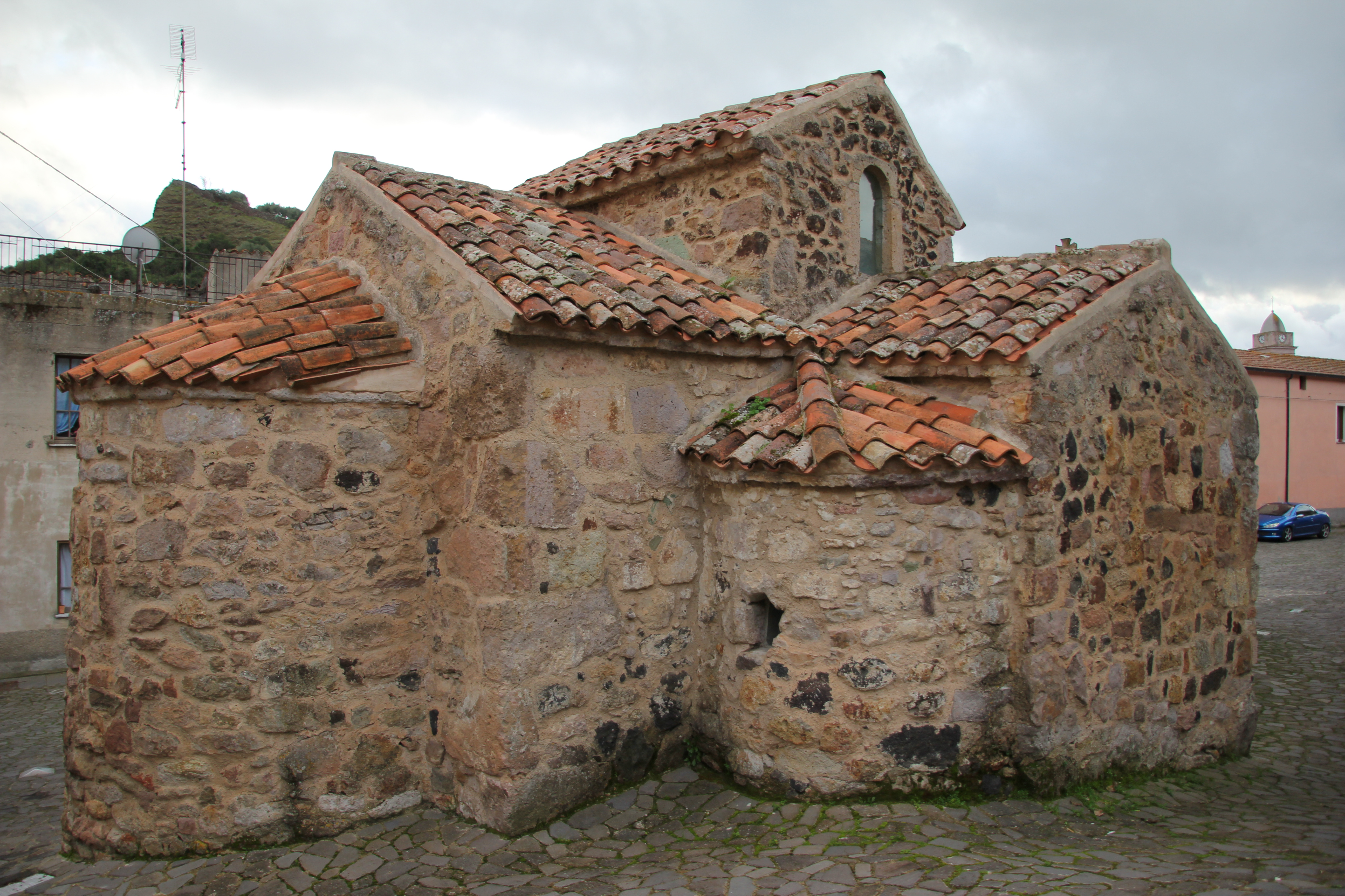 Ittireddu - Chiesa di Santa Croce